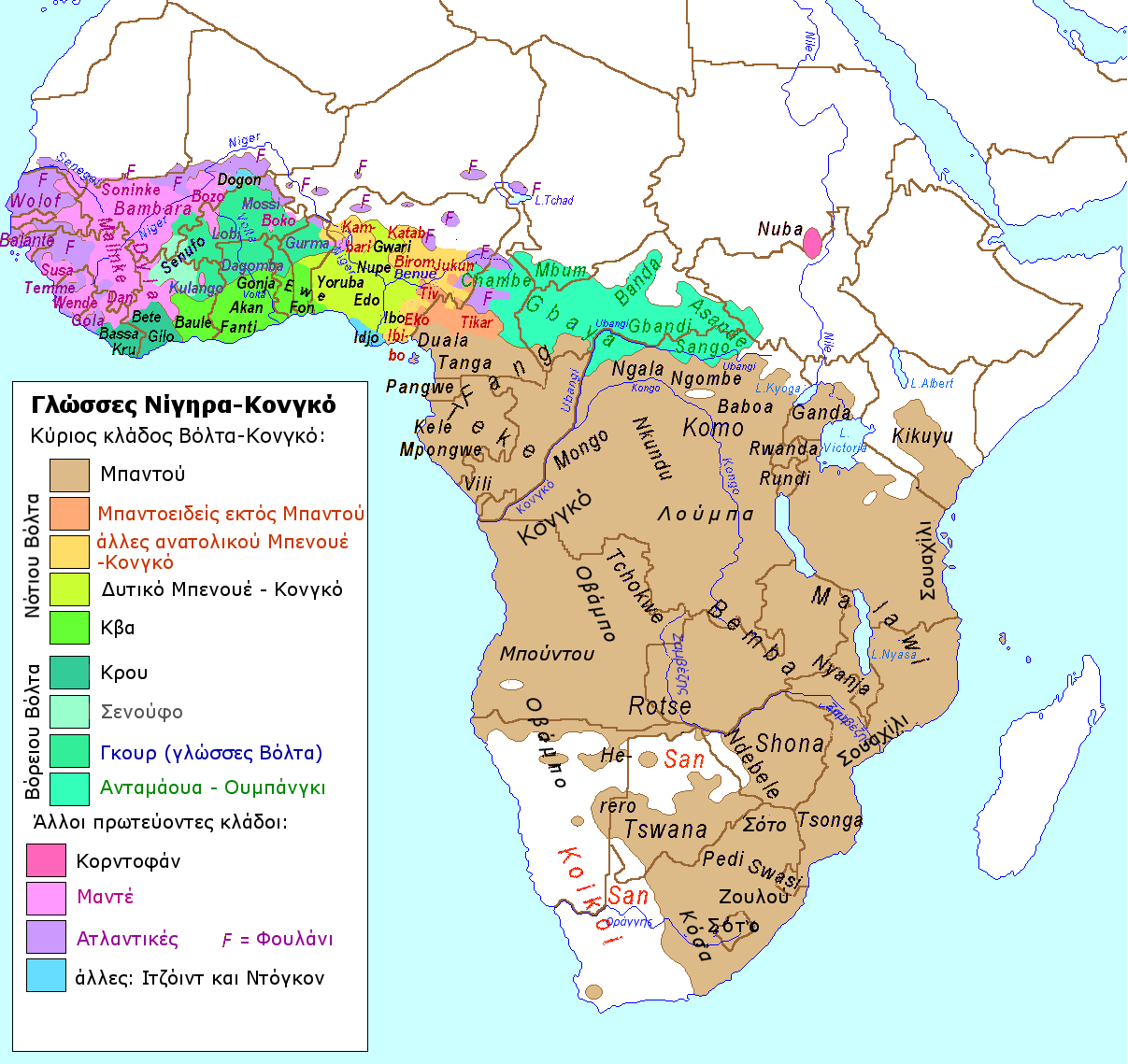 Χάρτης που απεικονίζει τις γλώσσες Νίγηρα-Κόνγκο